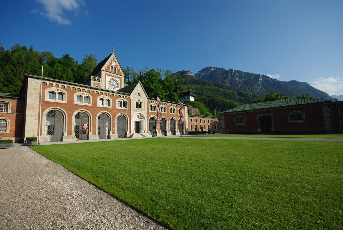 Alte Saline, Hauptgebäude (Quellenbau) mit Brunnhauskapelle. Rechts ein Teil der angeschlossenen Wirtschaftsgebäude, im Hintergrund der Predigtstuhl mit dem Berghotel der Predigtstuhlbahn.This is a photograph of an architectural monument. Boarisch: Oide Salin, Haupthaus (Quellnbau) mit Brunnhauskapelln. Im Hintergrund da Predigtstui mit da Predigtstuibahn und da Detznkopf.